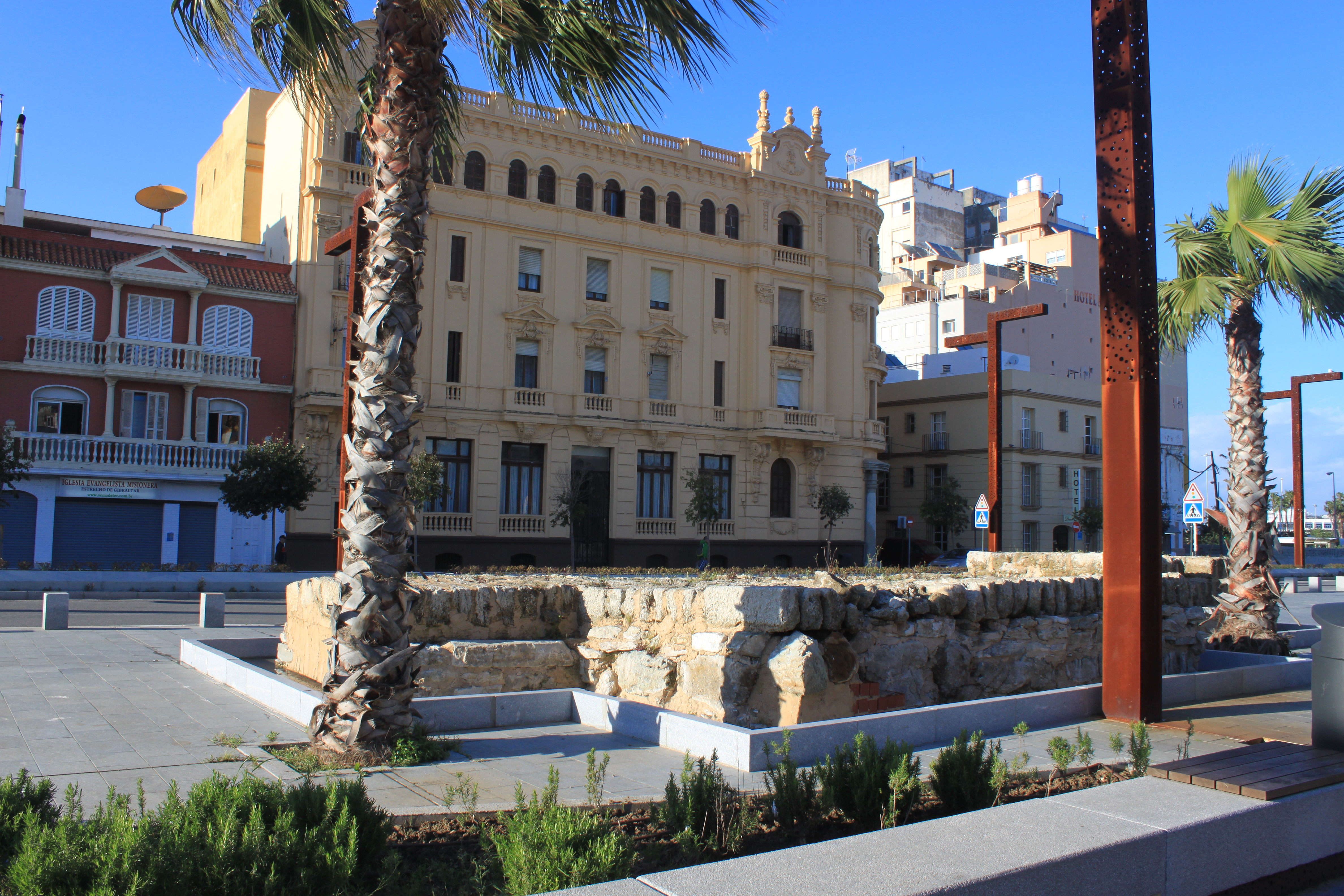 Restos de las atarazanas califales de Algeciras, España, situadas en el Paseo del río de la Miel y trasladadas desde la Acera de la Marina en 2012.